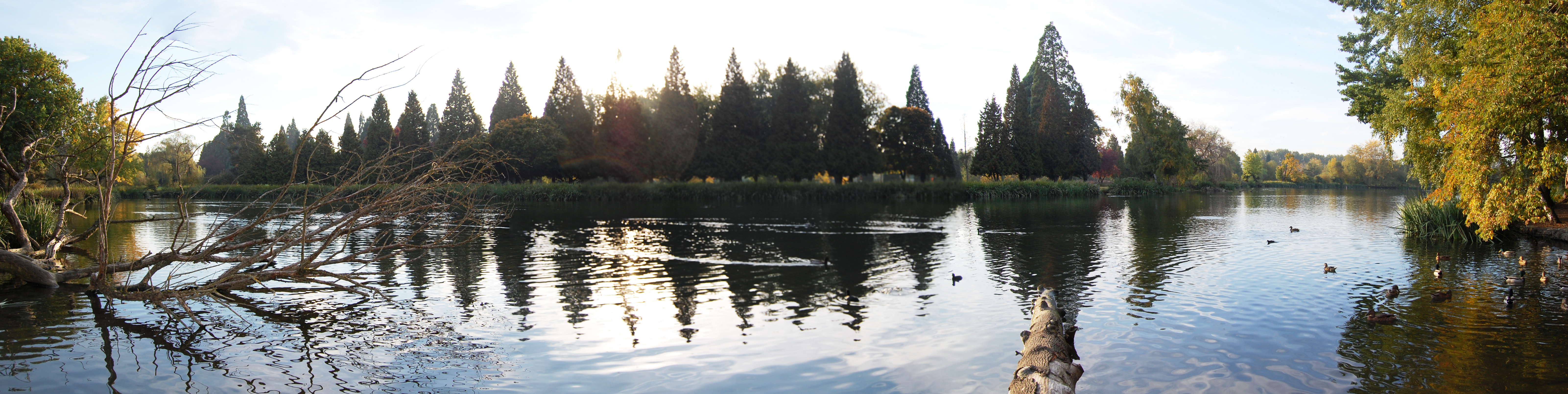 A lake in Crystal Springs Rhododendron Garden in Portland, Oregon.